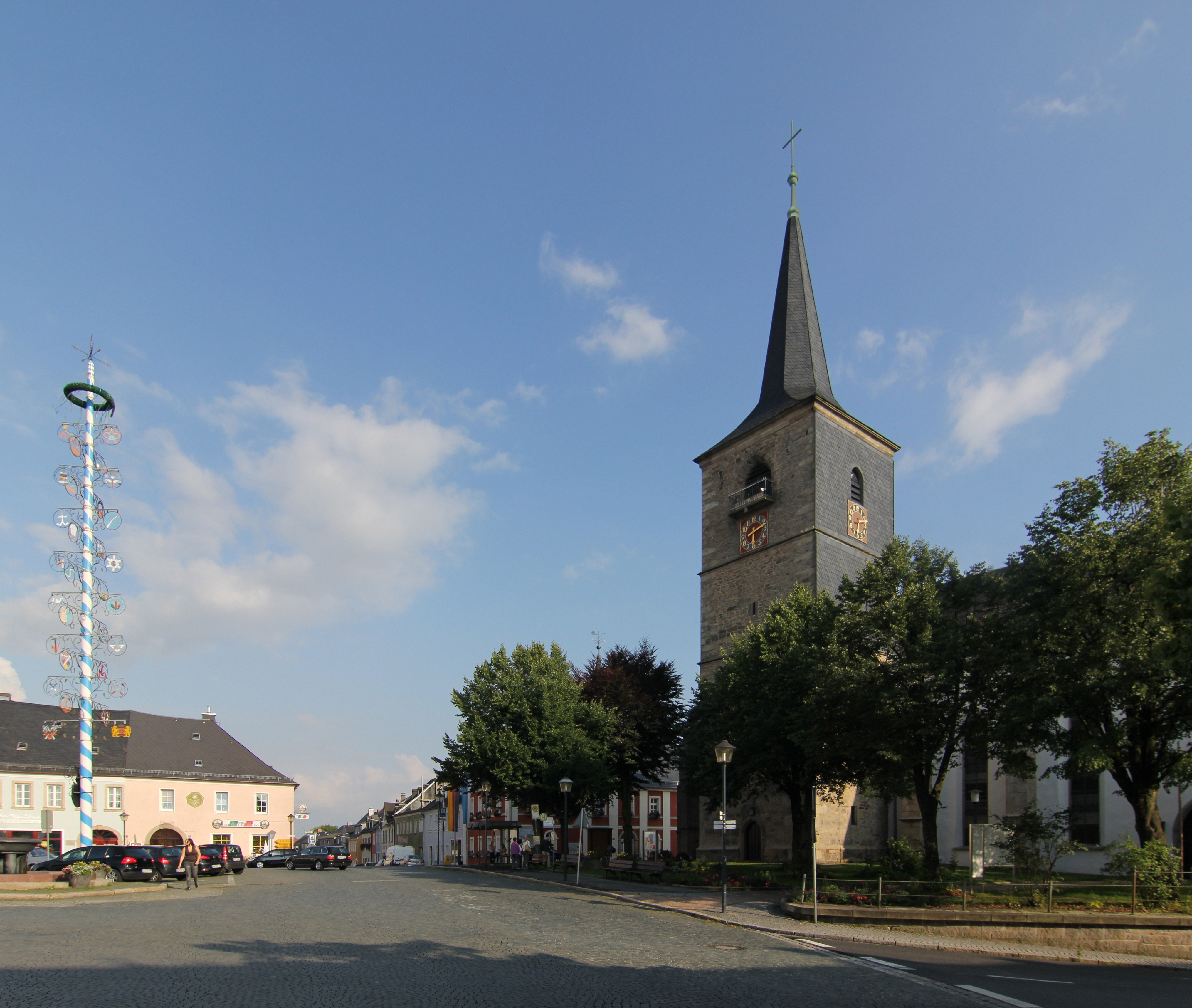 Marktplatz in Weißenstadt, Franken